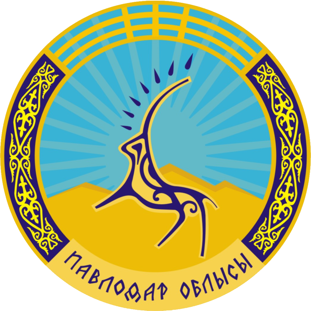 Логотип Павлодарской области. Утверждён областным маслихатом 1 октября 2011 года.